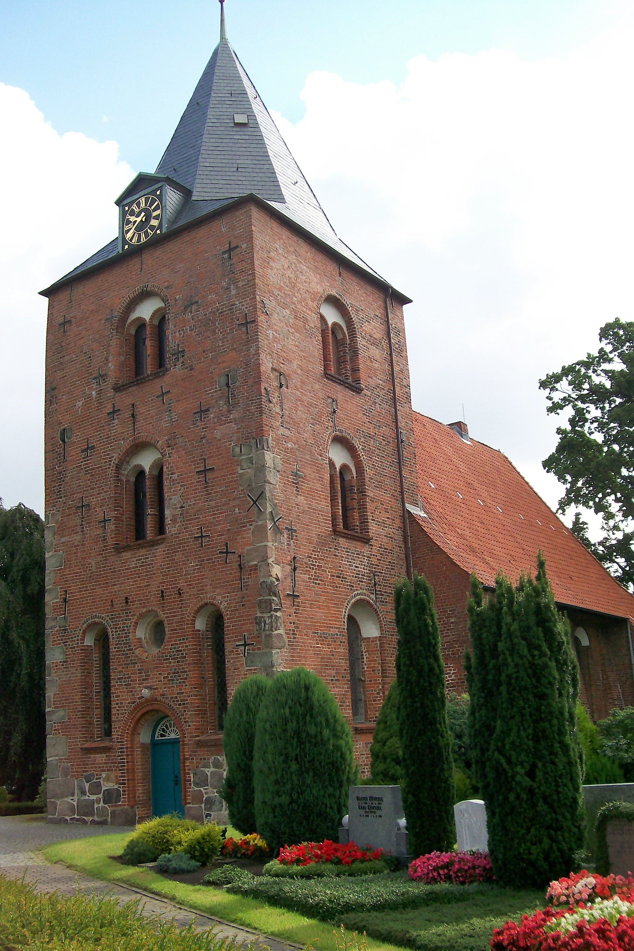 St. Georg church in Lübeck, Schleswig-Holstein, Germany, view from cemetary